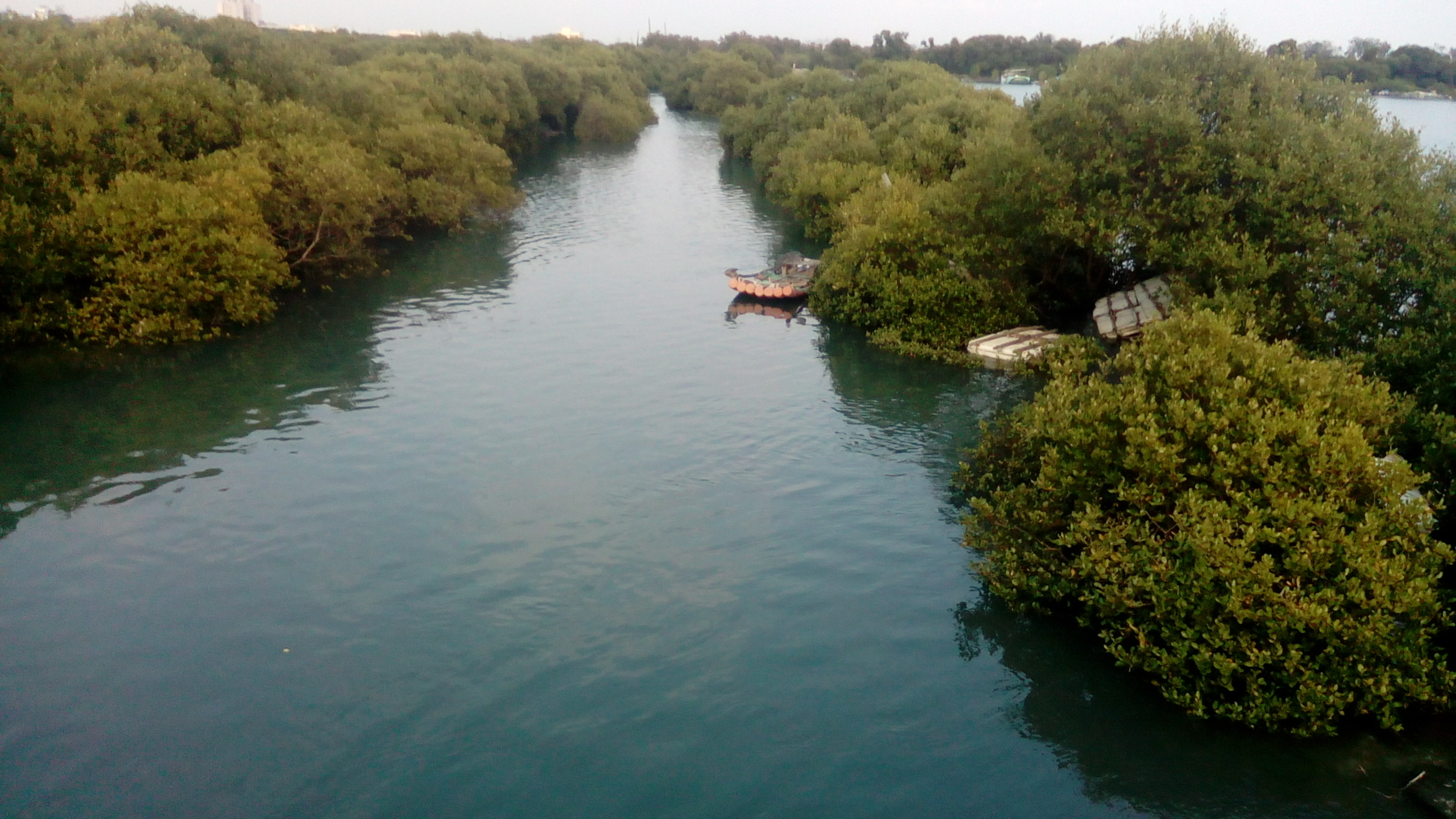 同上